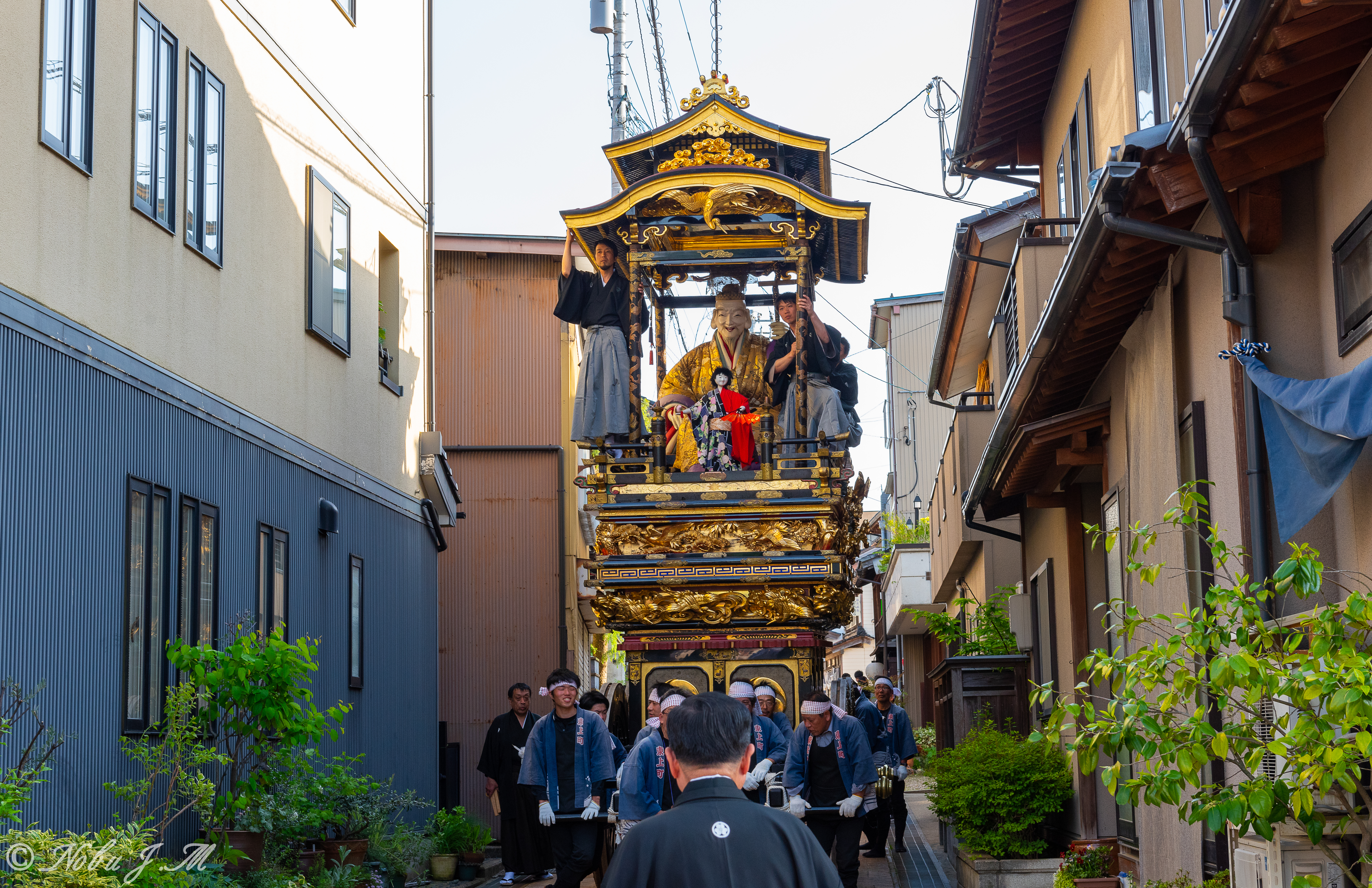 富山県南砺市城端町で毎年5月5日に行われている曳山祭り。ユネスコ無形文化遺産でもある。